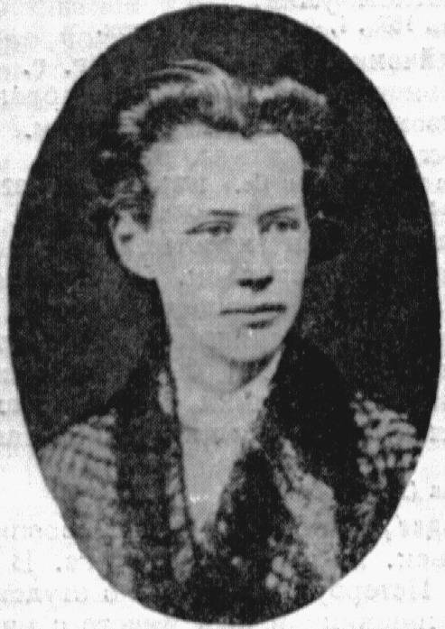 Хоржевская Александра Сергеевна - русская революционерка, народница